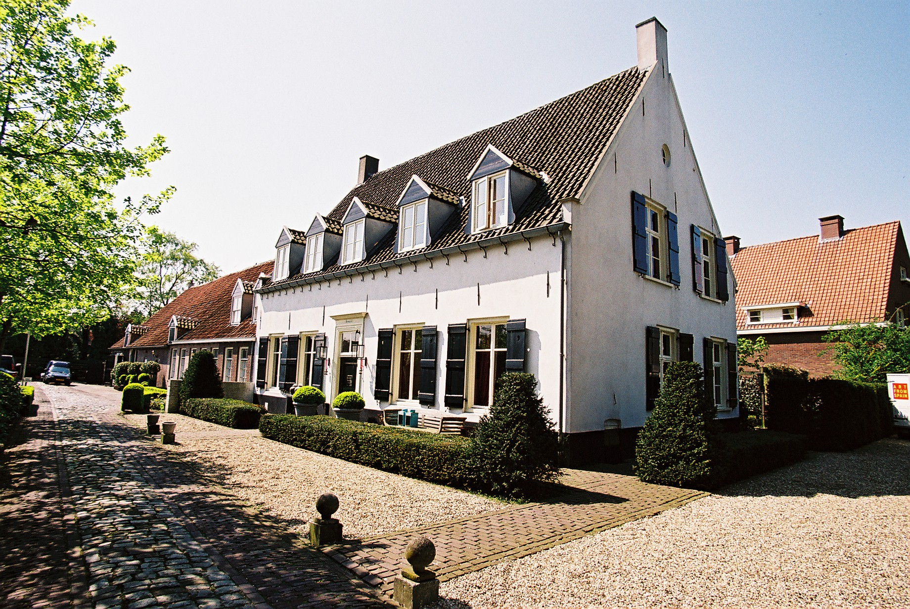 Slot Borssele te Oosterhout.